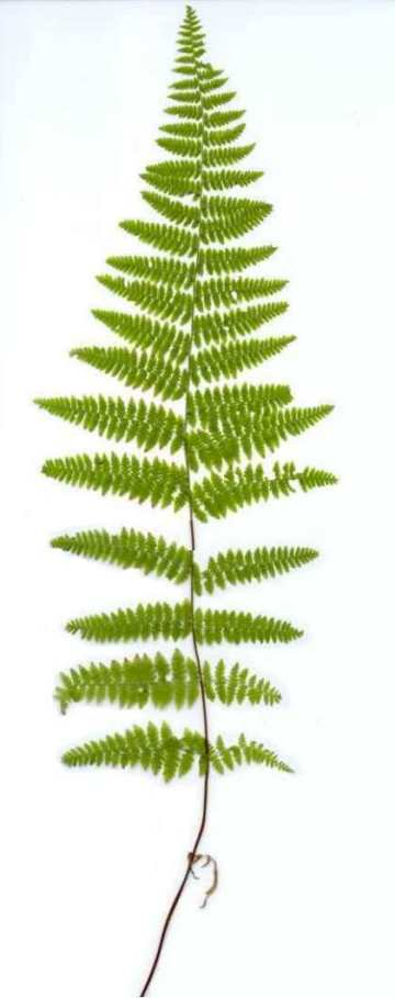 Dennstaedtia punctilobula